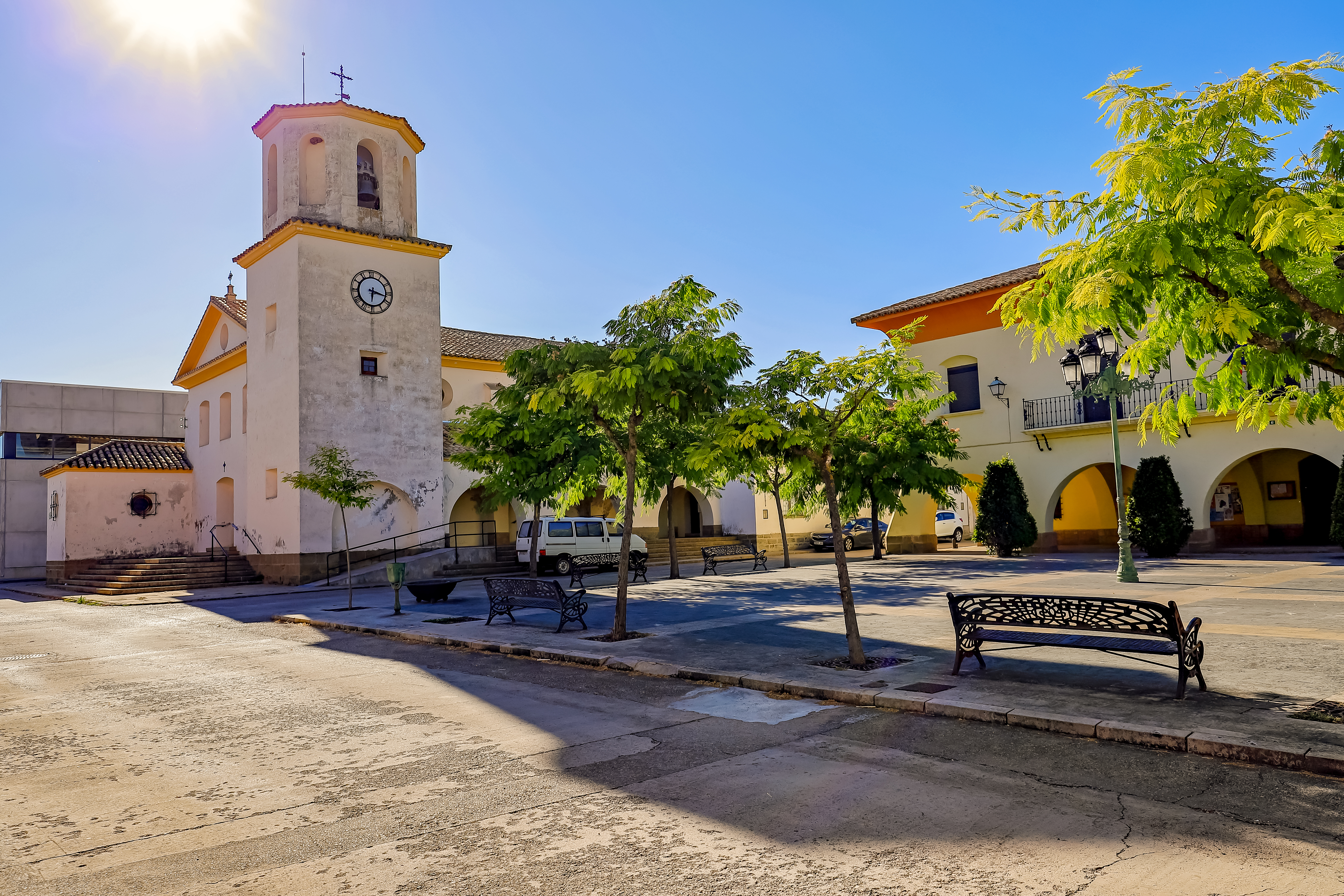 Banastás es un municipio de la comarca Hoya de Huesca, en la provincia de Huesca.